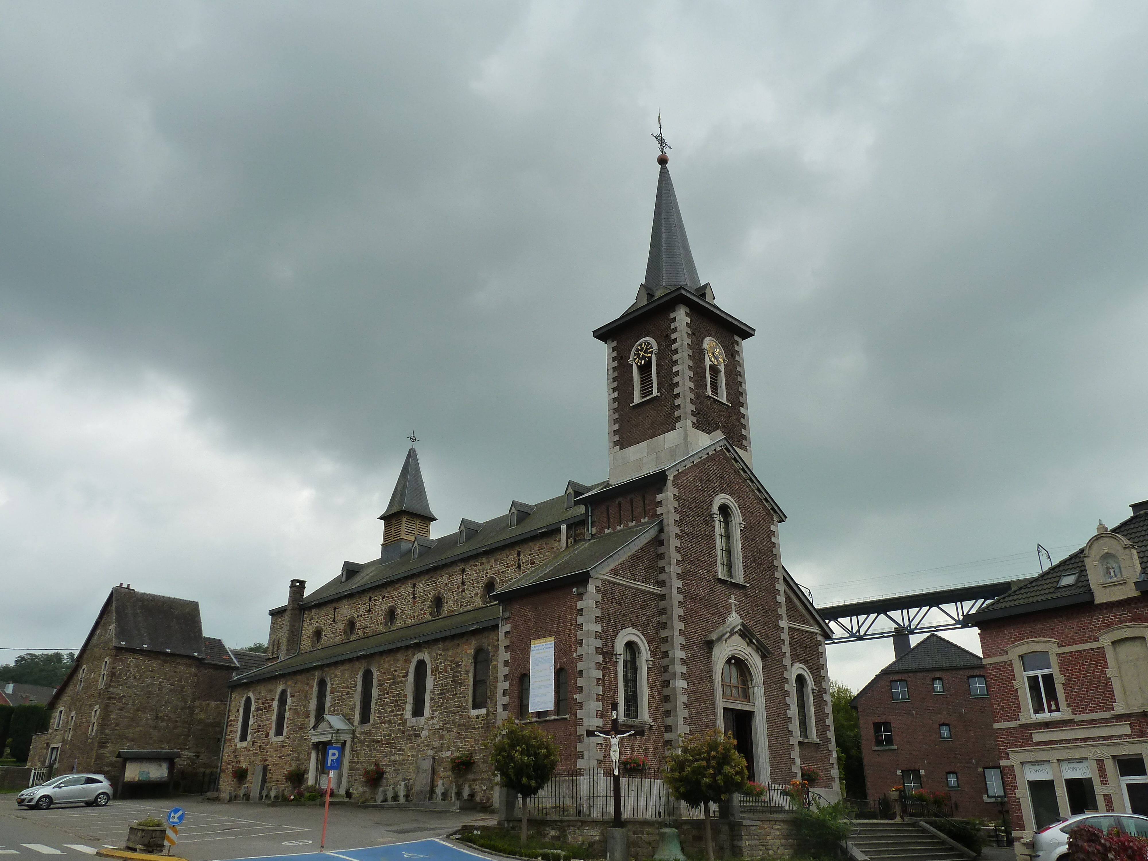 Église Saint-Remy, Moresnet, Plombières, Belgique